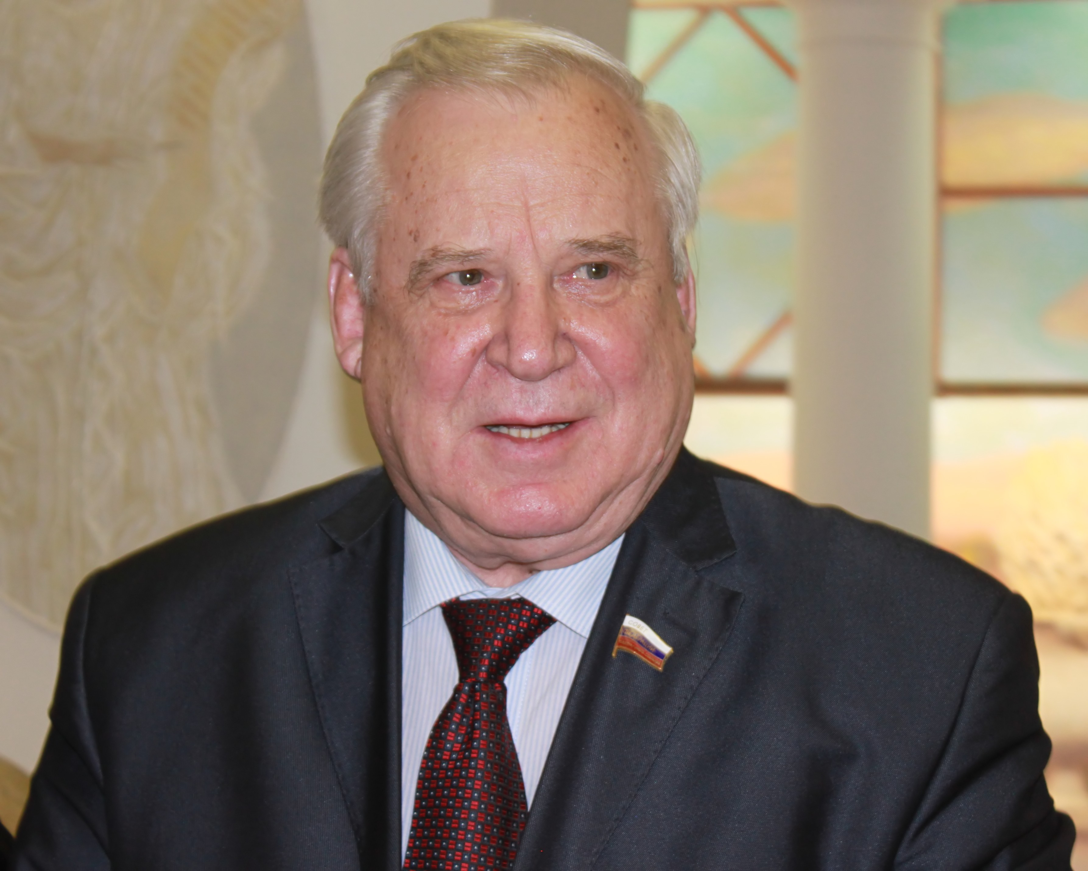 Nikolay Ivanovich Ryzhkov